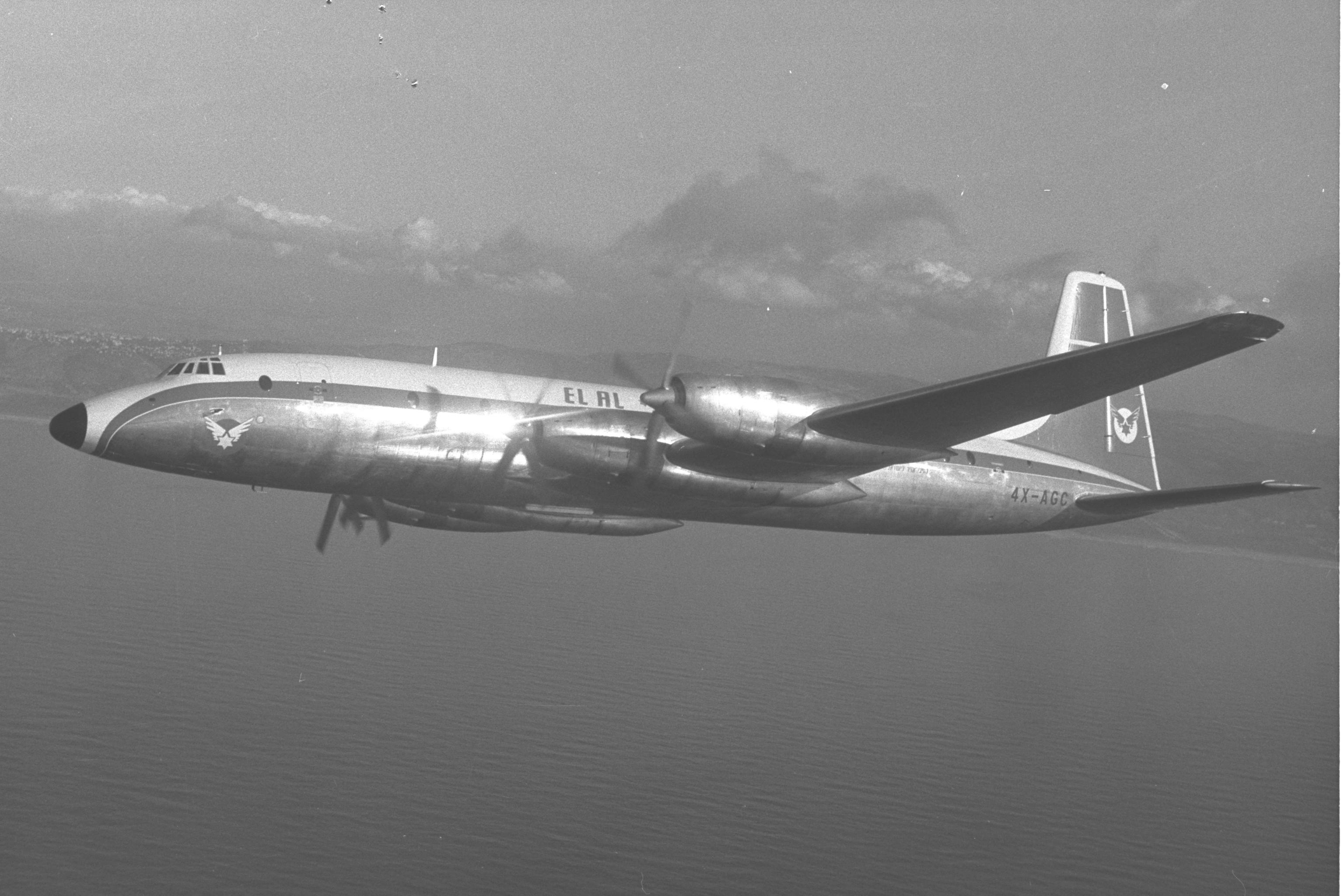 El Al Bristol Britannia